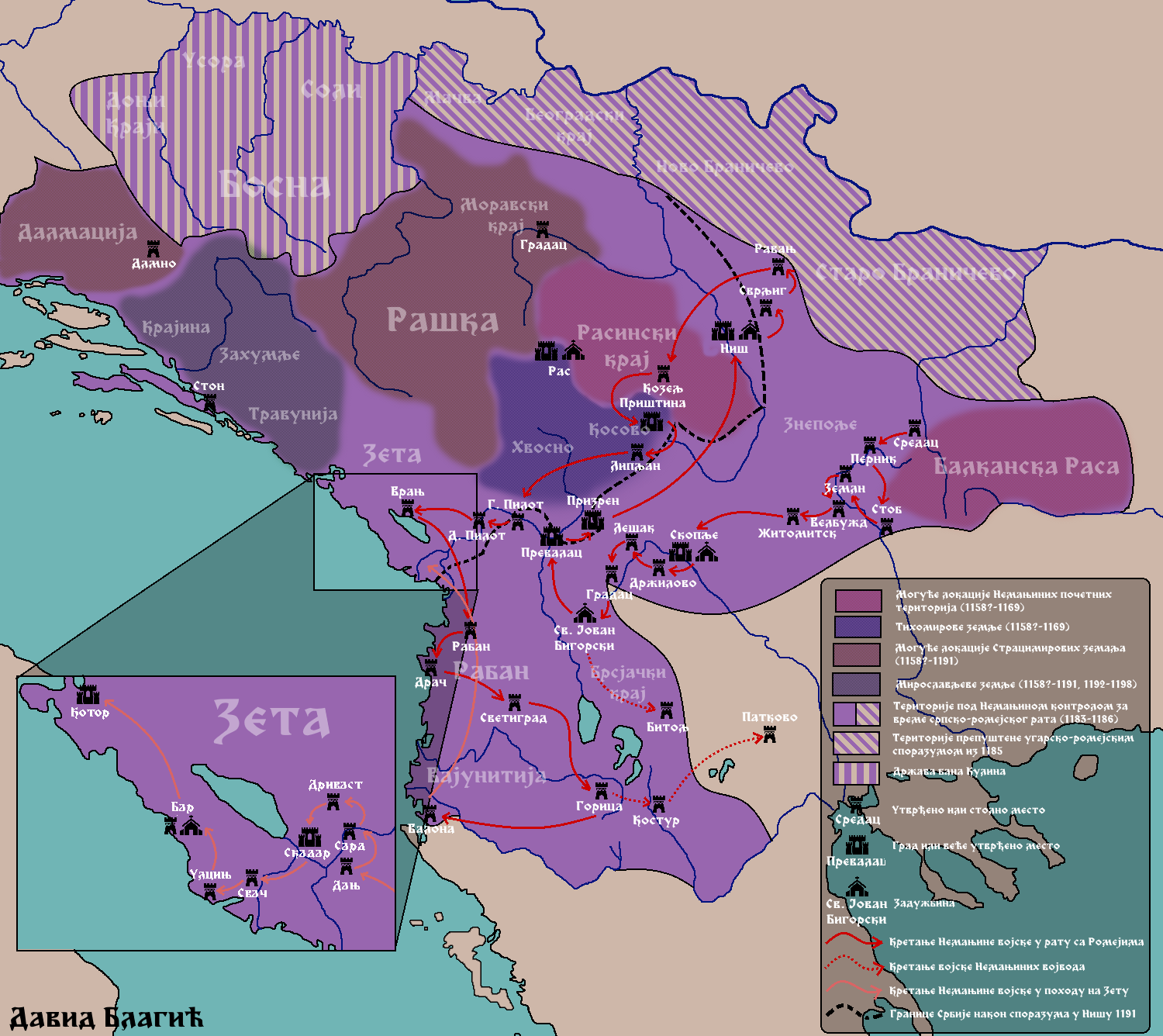 Карта укључује земље Стефана Немање и његове браће, Немањина освајања и кретање српске војске у српско-византијском рату 1183-1187, као и границе Немањине државе на самом крају његове владавине.